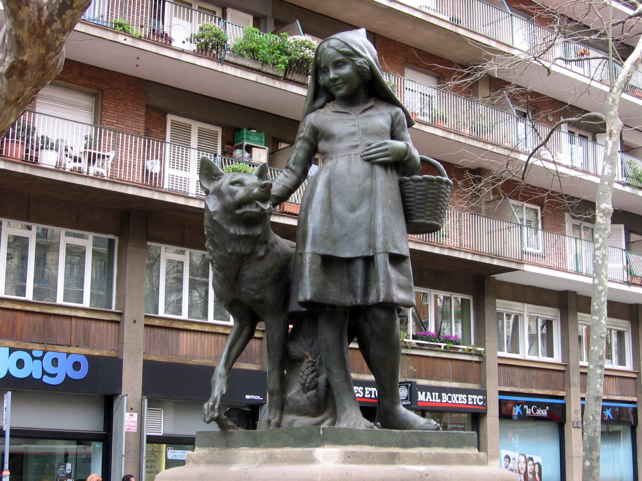 Fuente de la Caperucita (1921), de Josep Tenas, Paseo de San Juan/Rosellón.